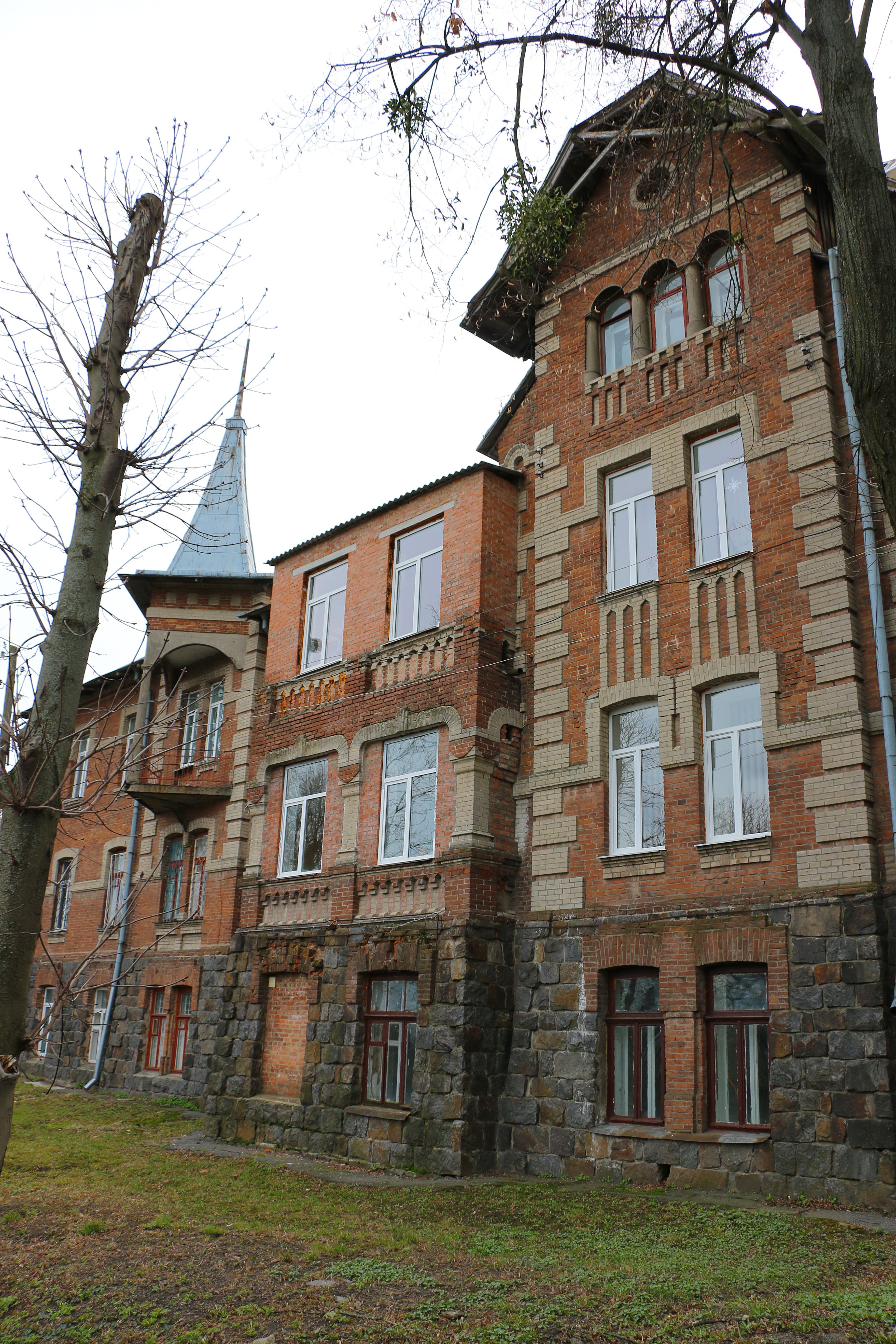 Особняк-лікарня (Палац), Вінниця, вул. М. Оводова (Козицького), 1